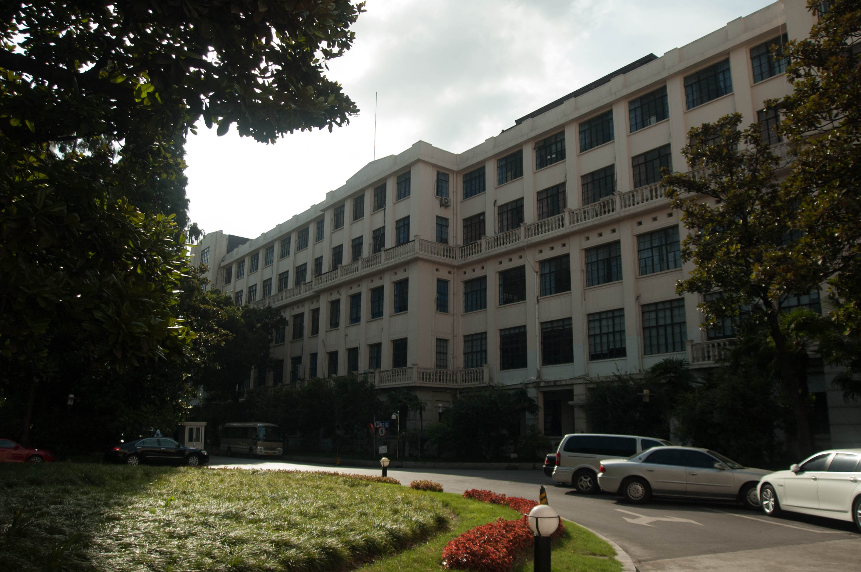 上海犹太研究中心坐落的大楼